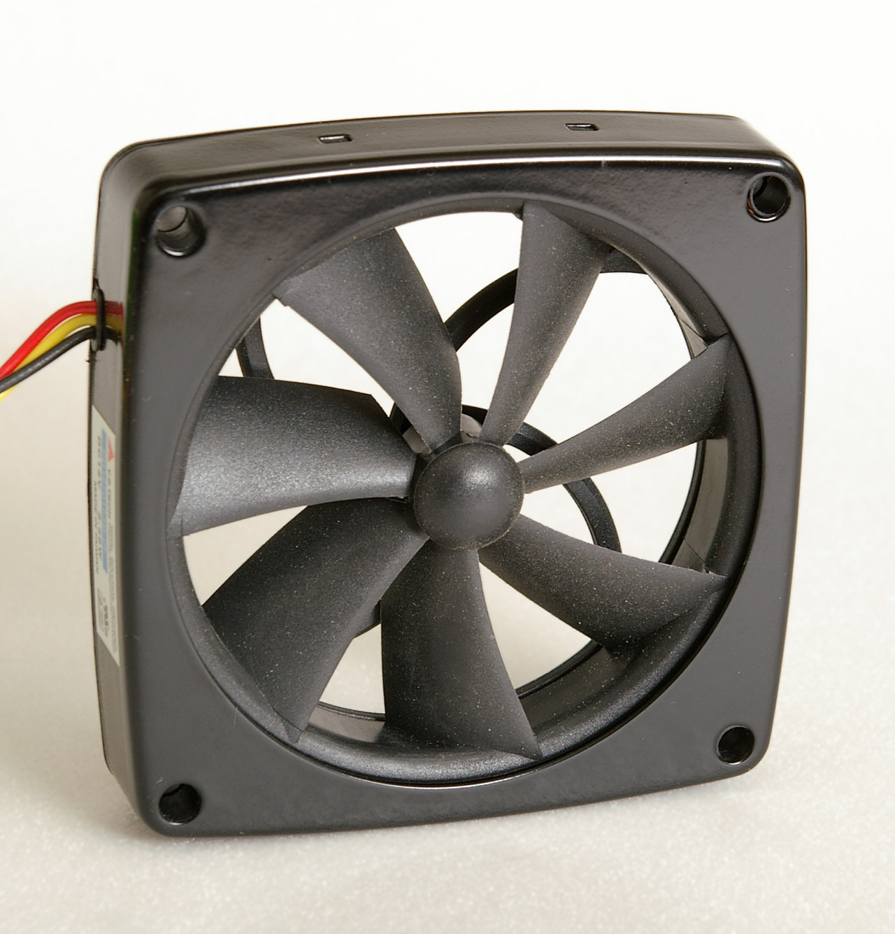 Kleinluefter mit aussenliegendem Antriebsmotor. (Yen Sun Technology Corporation)